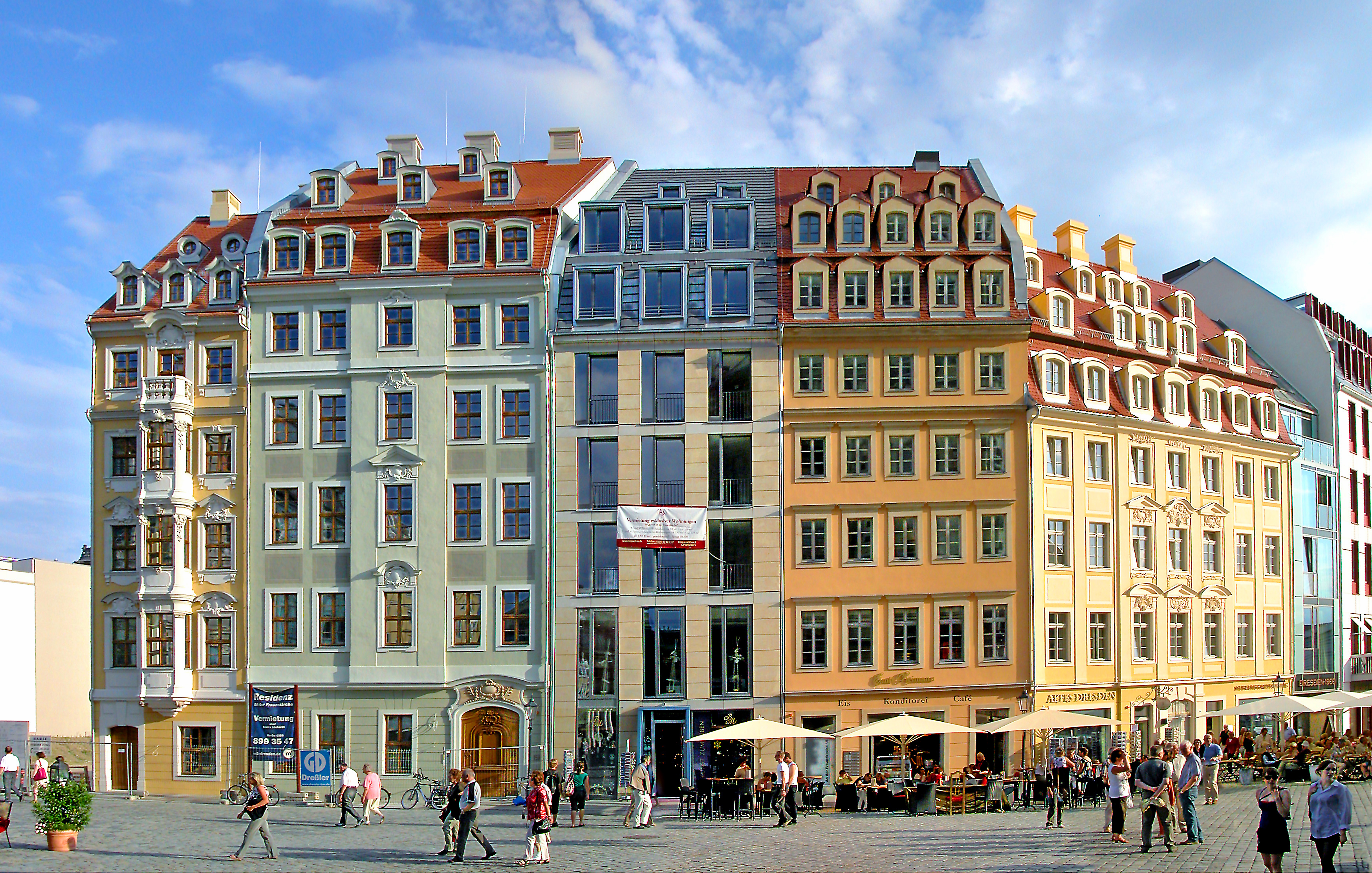 07.06.2008 01067 Dresden-Altstadt: Baugebiet Neumarkt, im Quartier III "Juwel an der Frauenkirche". - Bürgerhaus An der Frauenkirche 16. 1730 für die Familie des Rentkalkulators Gottfried Kretzschmar erbaut, evtl. nach Plänen von M. D. Pöppelmann. Nachbau 2008 fertiggestellt. Im Gebäude u.a. das "Augustiner Brauhaus". - Haus An der Frauenkirche 17. 1762 nach Plänen von Samuel Locke erbaut. Nachbau 2008 fertiggestellt. Im Gebäude u.a. das "Augustiner Brauhaus". - Haus An der Frauenkirche 18. Moderner Neubau, 2008. - Rechts: Haus An der Frauenkirche 19. Neubau mit barockem Duktus, 2008. - Bürgerhaus An der Frauenkirche 20. Baumeister Samuel Locke hat das Haus 1765 errichtet. Das Relief über dem mittleren Fenster im 2. OG zeigt, wie die Sonne durch die Wolken bricht - eine Anspielung auf den Wiederaufbau des Hauses nach dem Siebenjährigen Krieg.